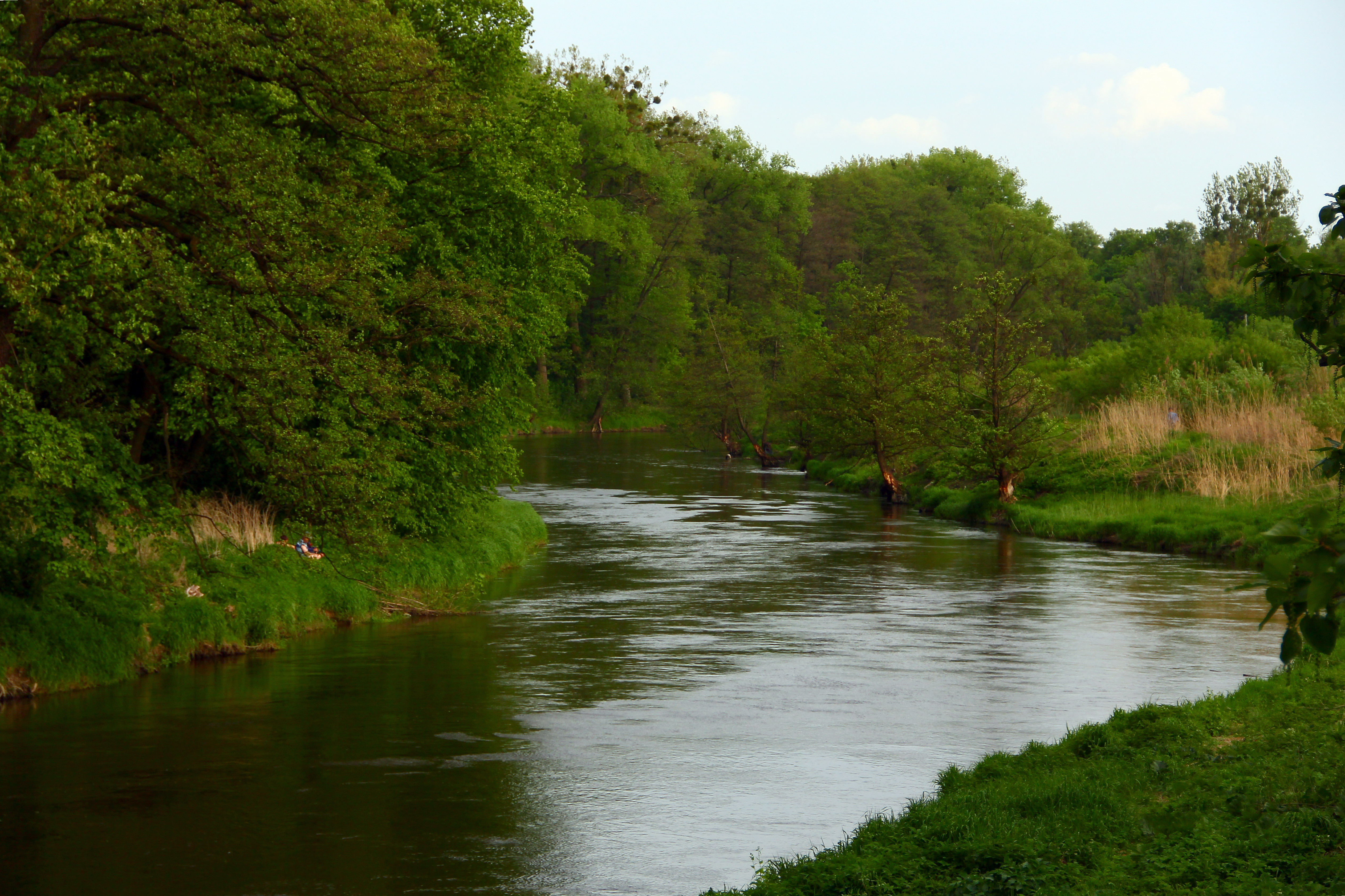 Bartoszyce. Rzeka Łyna.